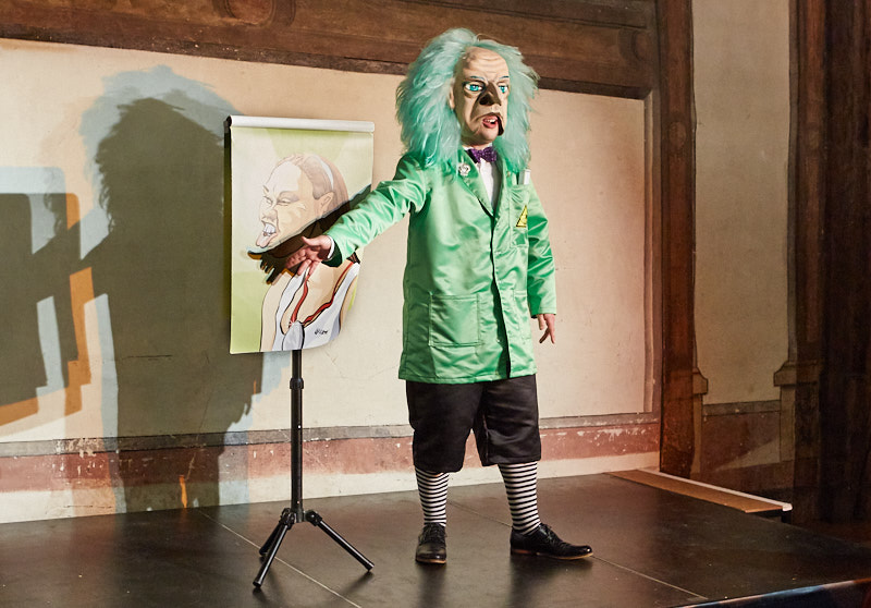 Ein Schnitzelbank an der Basler Fasnacht mit seinem Helgen (Bilder) an einem Auftritt.